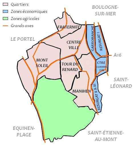 Quartiers et grands axes d'Outreau (Pas-de-Calais, France)